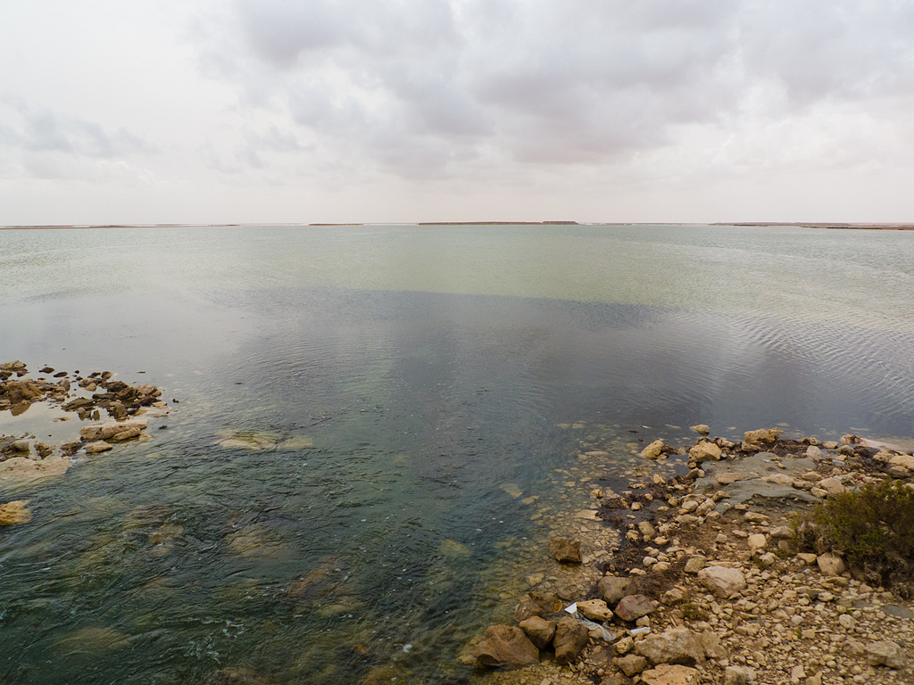 20100928-P1100501